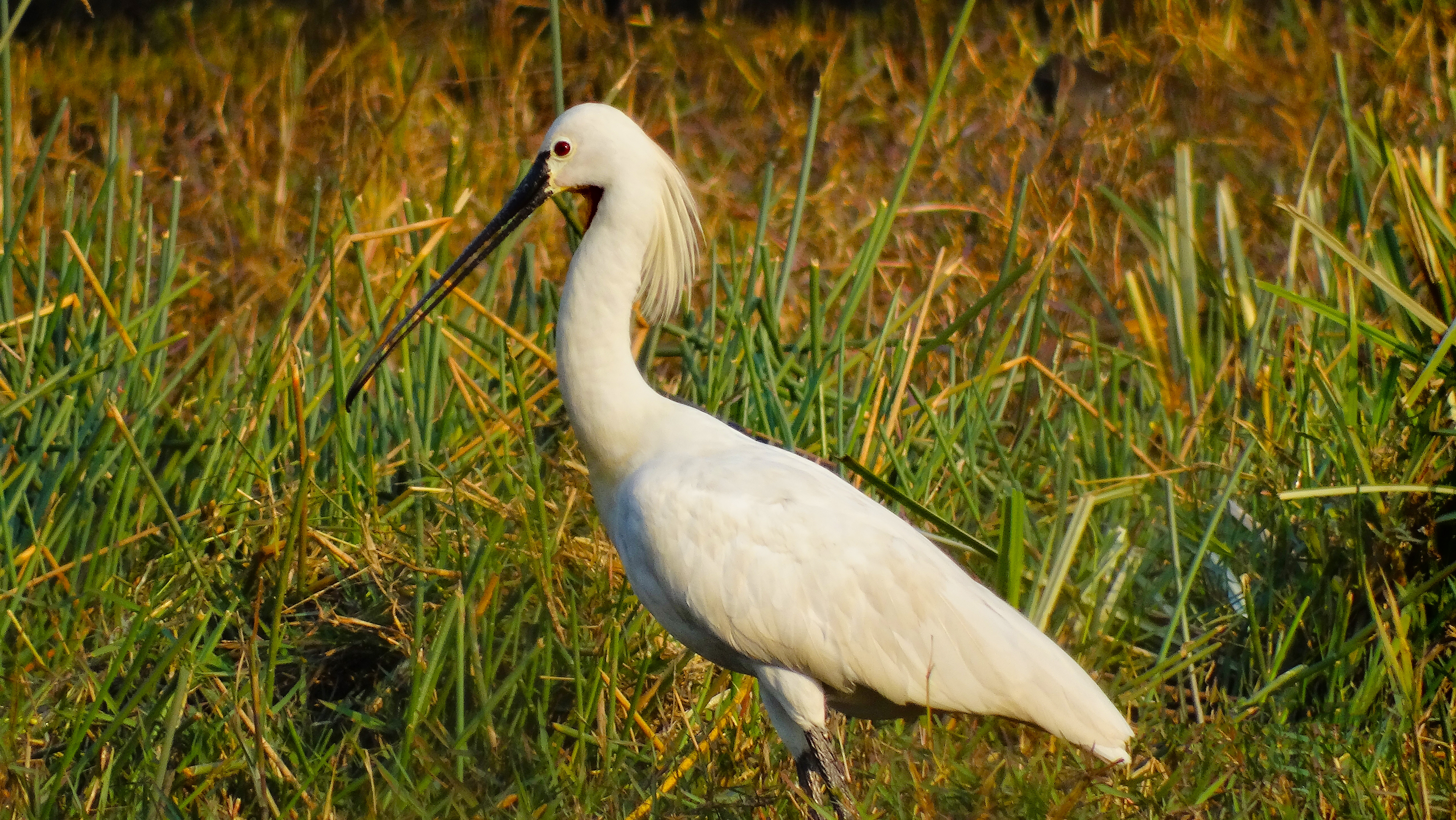 অসমীয়া: ইউৰেচিয়ান স্পুনবিল, ভৰতপুৰ পক্ষী উদ্যানৰ ভিতৰত